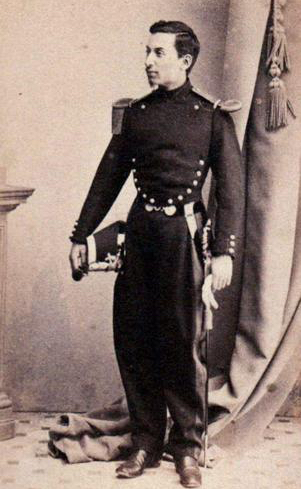 François-Maurice Allotte de La Fuÿe (1844-1939), est un militaire, archéologue et numismate